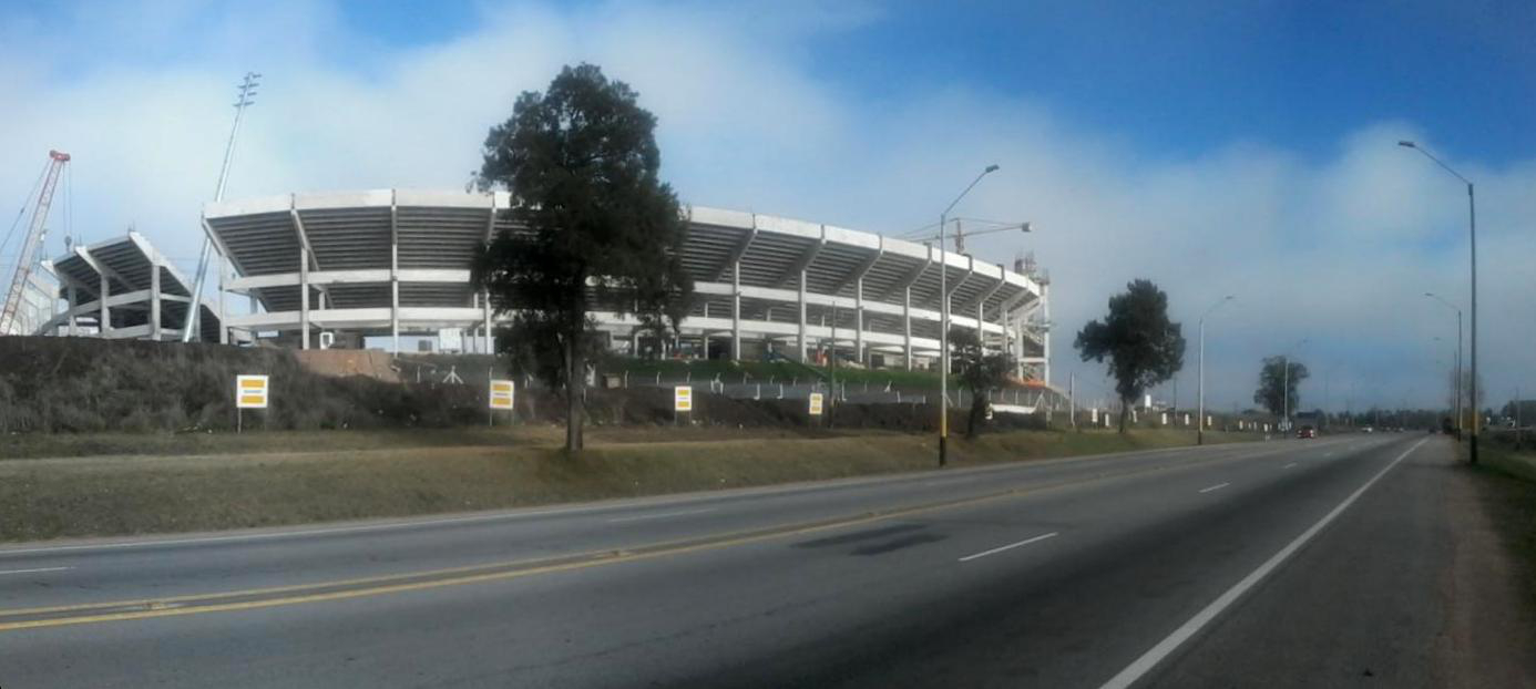 Estadio del Club Atlético Peñarol. Arquitecto Luis Rodríguez Tellado. Ubicación Ruta 102 (Ruta Nacional Perimetral Wilson Ferreira), Camino Manganga y Camino de los Siete Cerros, Montevideo, Uruguay. Vista desde la Ruta 102.